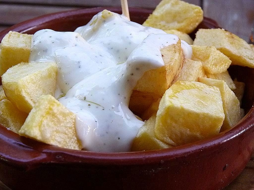 Una ración de patatas alioli.